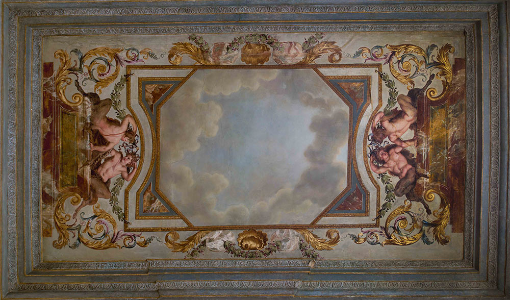 Bemalte Decke im Salon Lully © DFK Paris/Markus Schilder